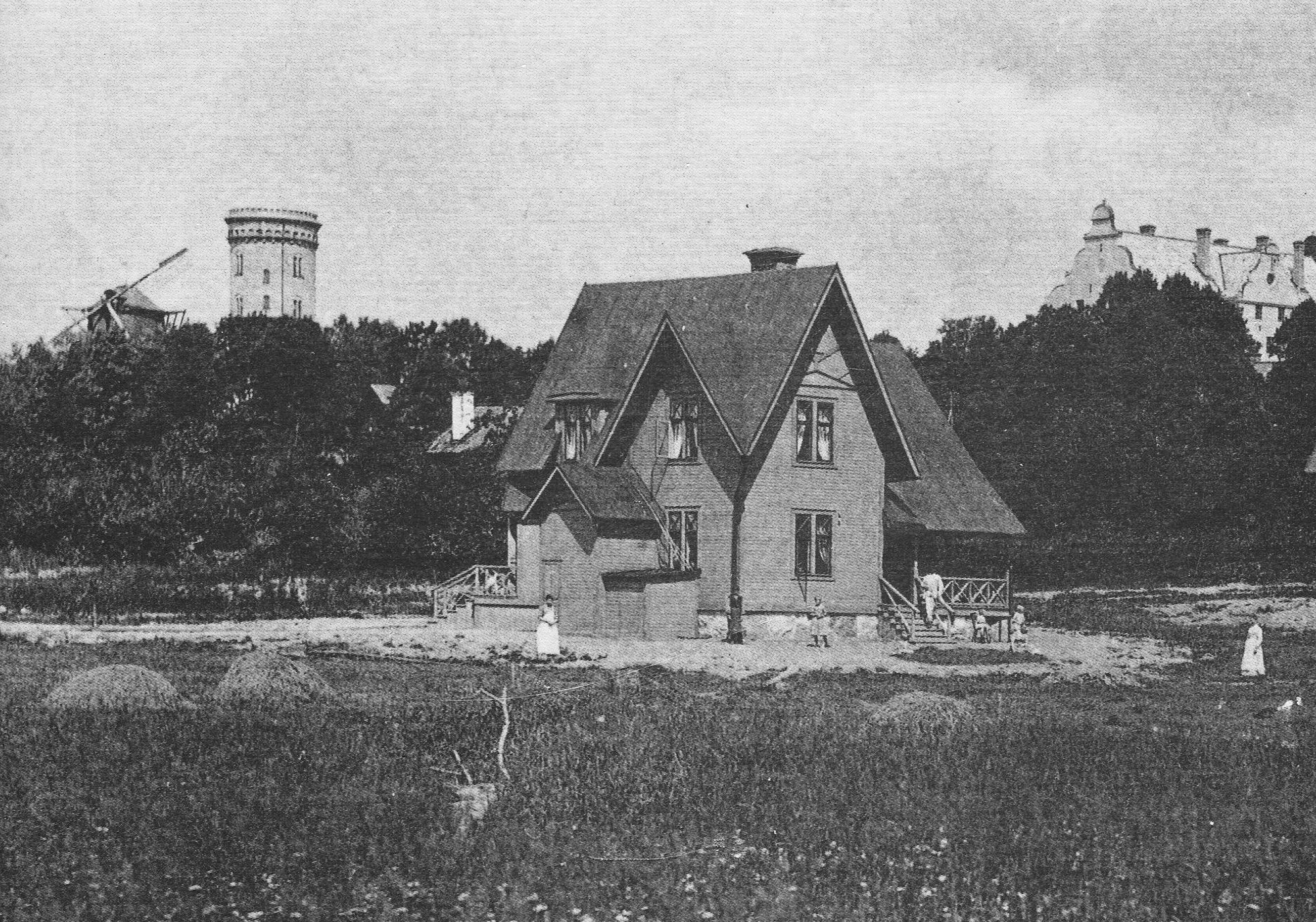 Djursholms vattentorn och gamla kvarnen samt ett av Djursholms första typhus, arkitekt Erik Lundroth